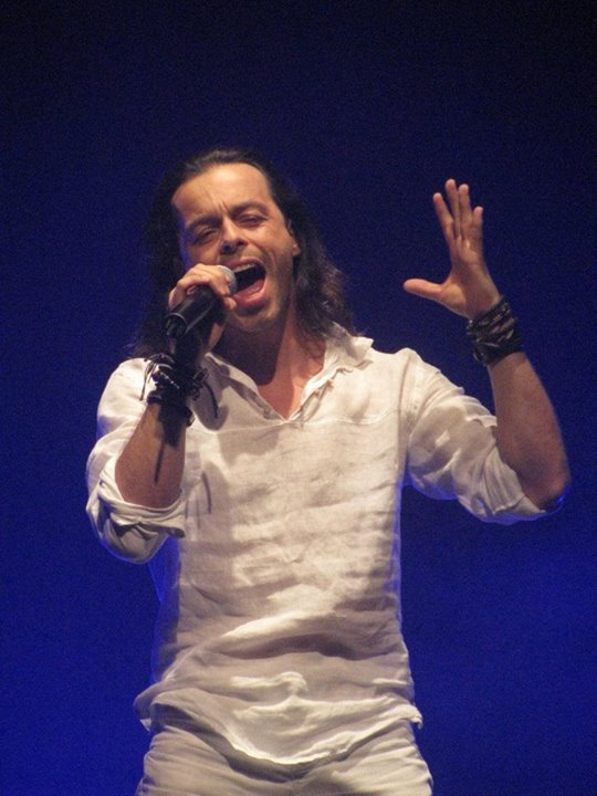 Nuno Resende à Avignon en juillet 2013 au Théâtre du Rouge Gorge